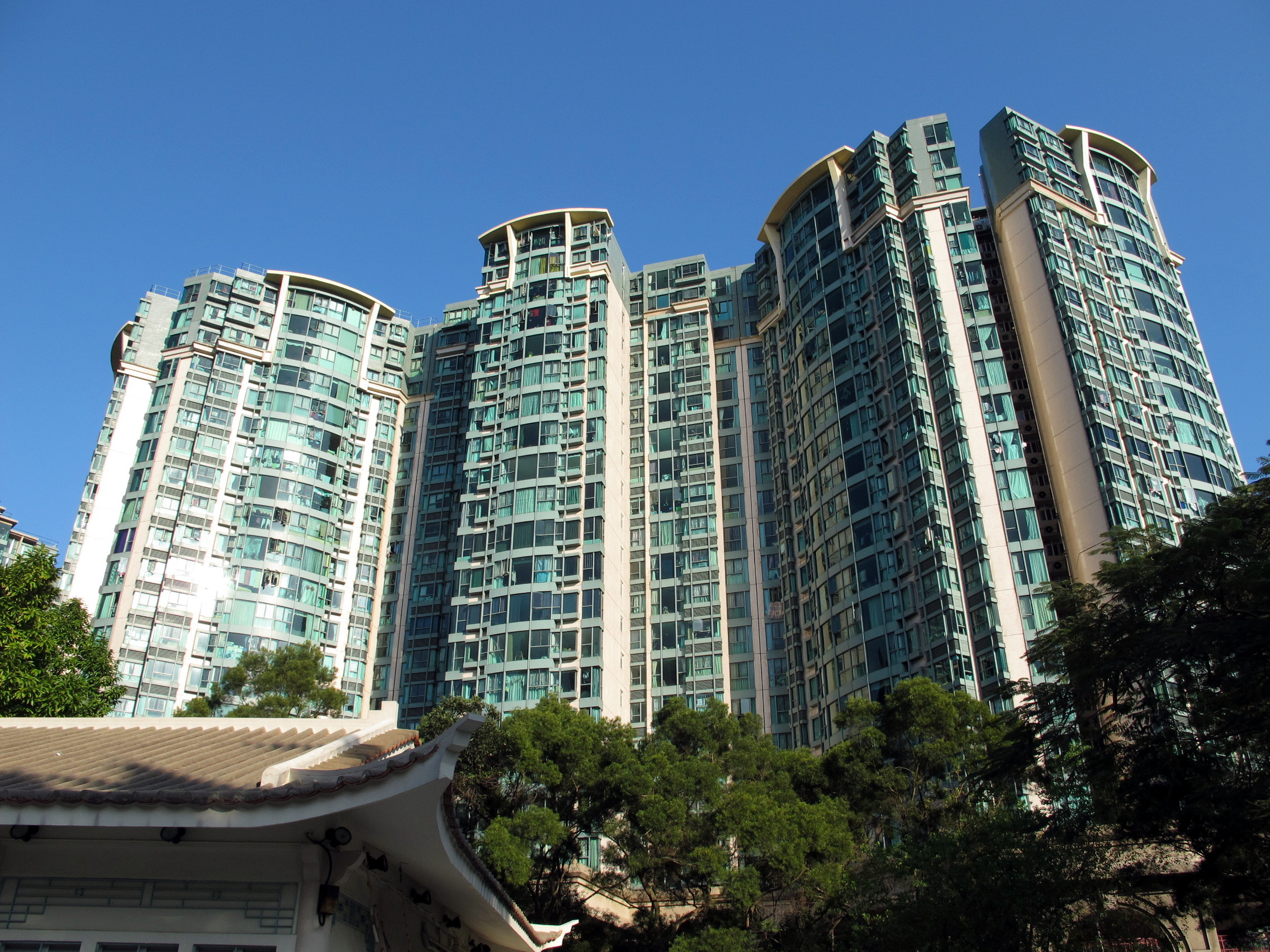 Laguna Verde The Greenwood